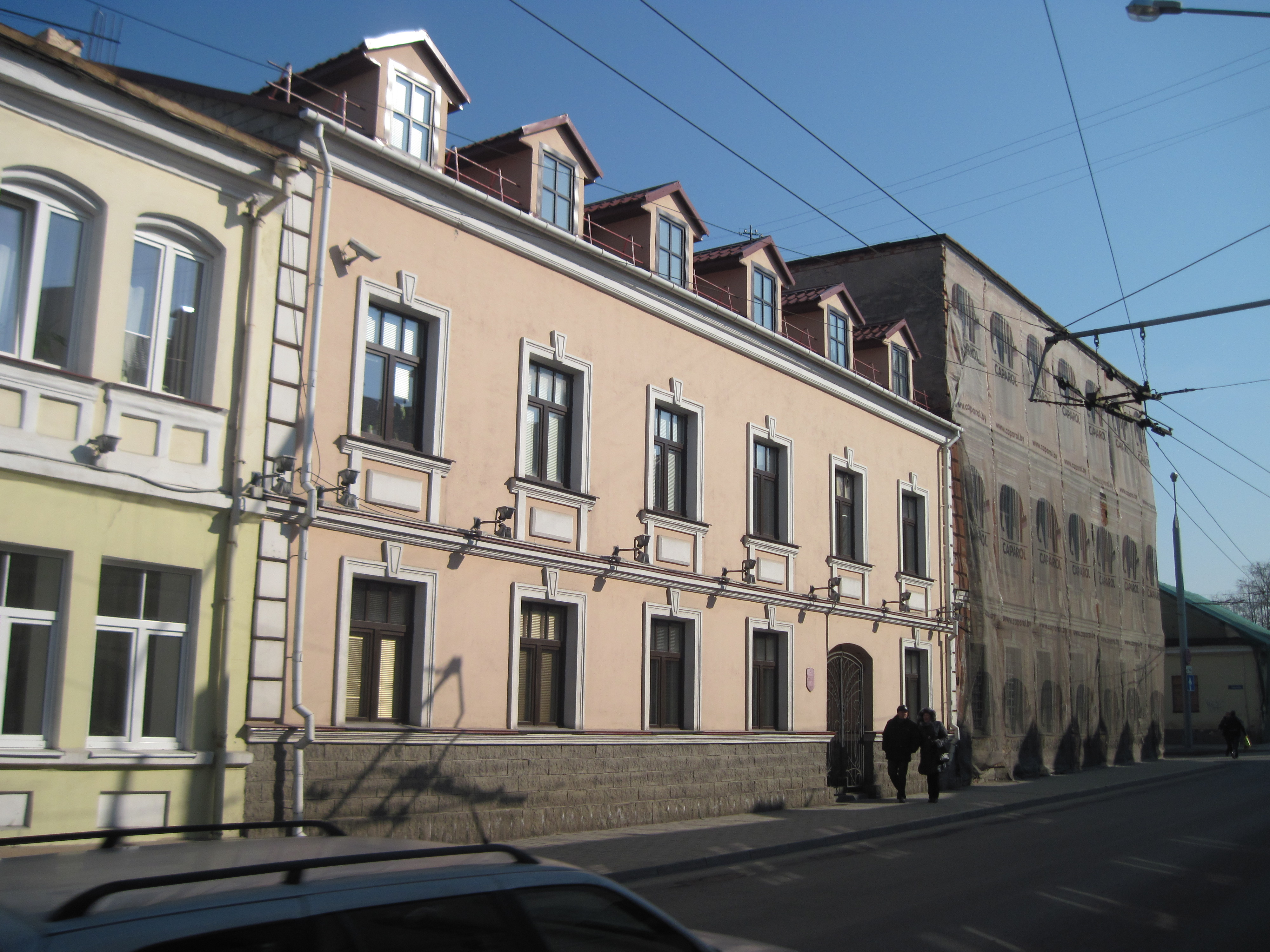 Забудова гістарычнага цэнтра Гродна. Вуліца К. Маркса, 20.